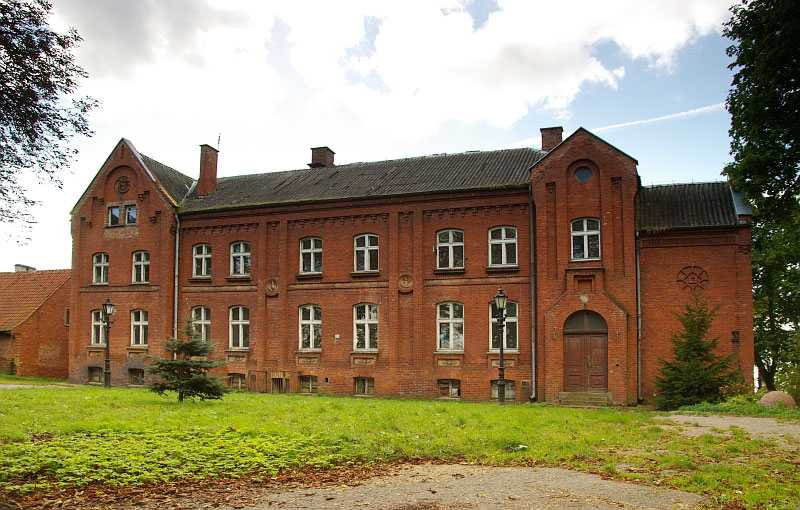 Zamek krzyżacki w Sobowidzu